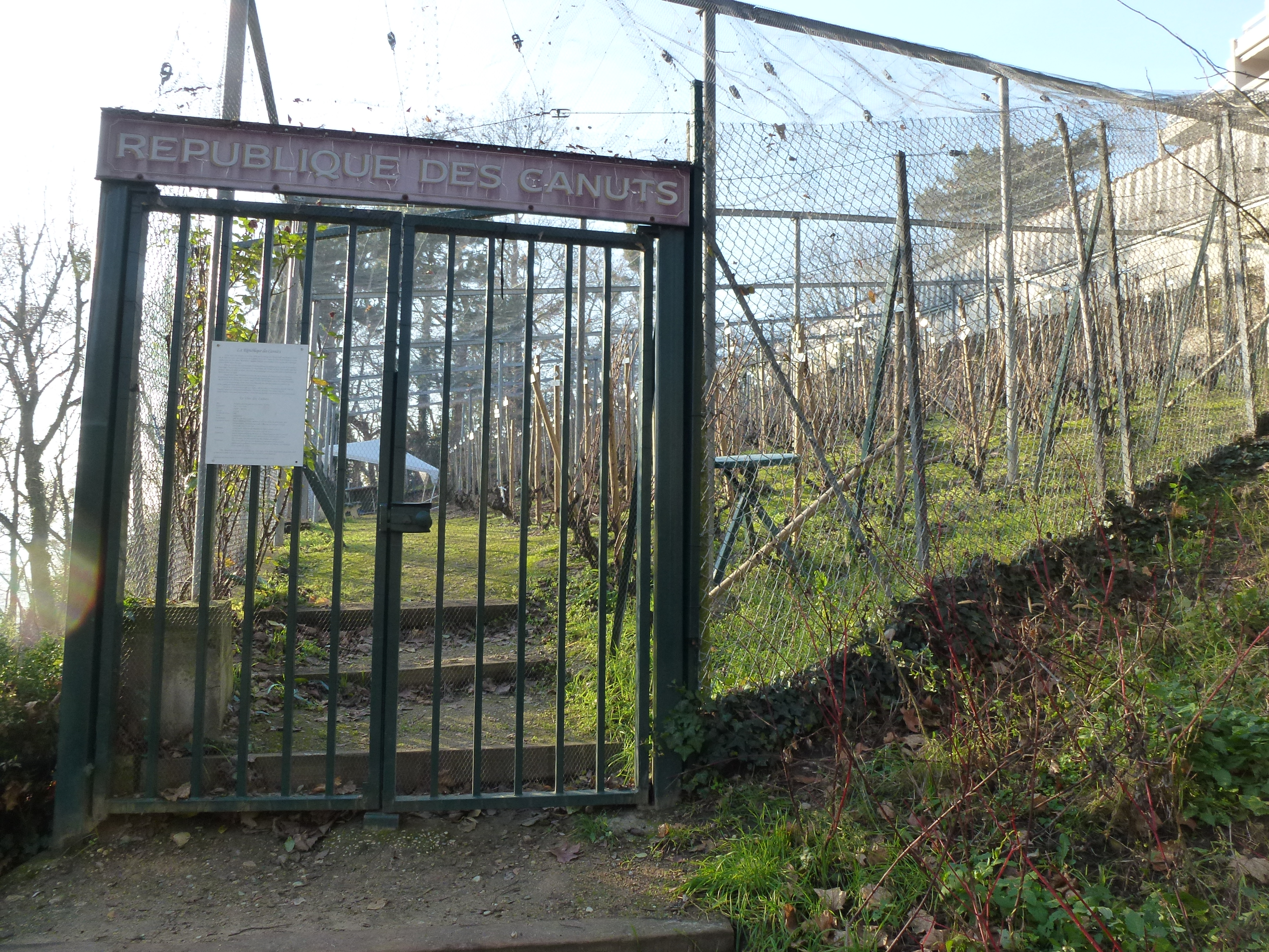 Parc de la Cerisaie à Lyon (4ème) - La vigne